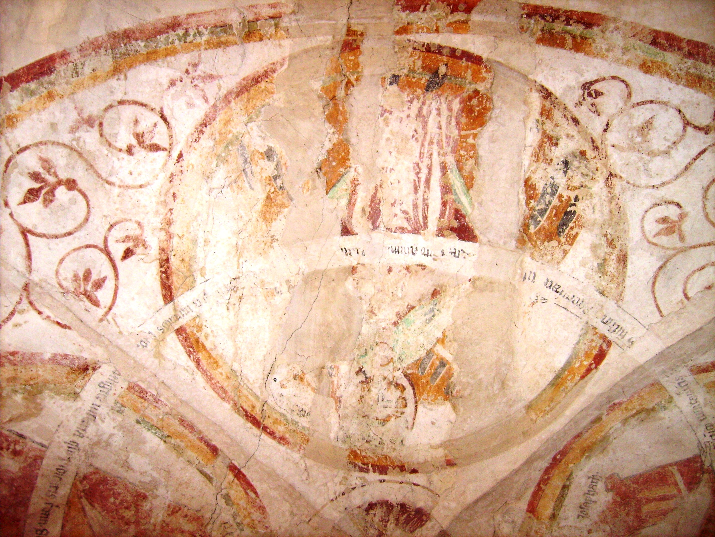 Fresken im Ostflügel des Kloster Wedinghausen